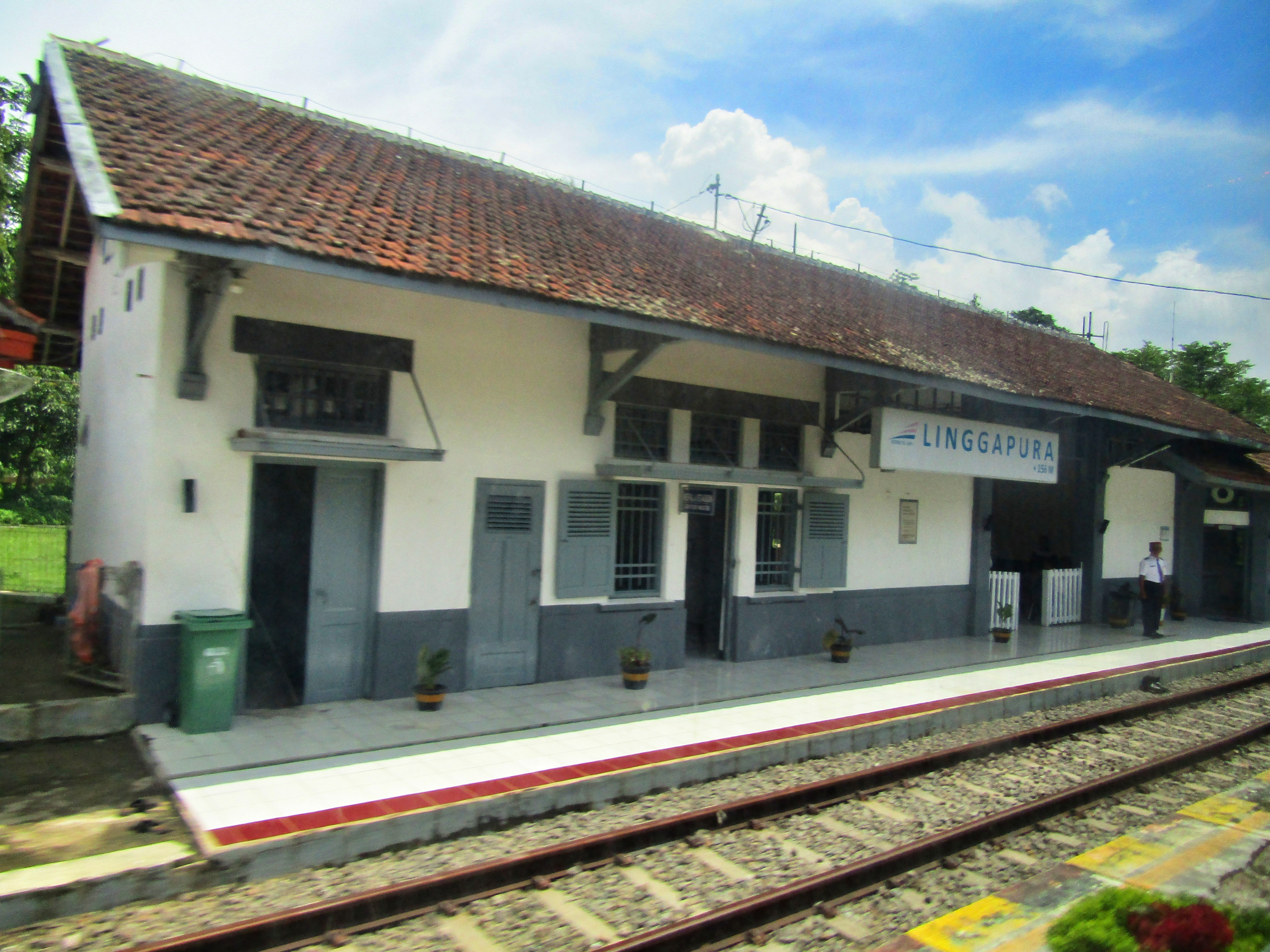 Tampak peron Stasiun Linggapura, 2019